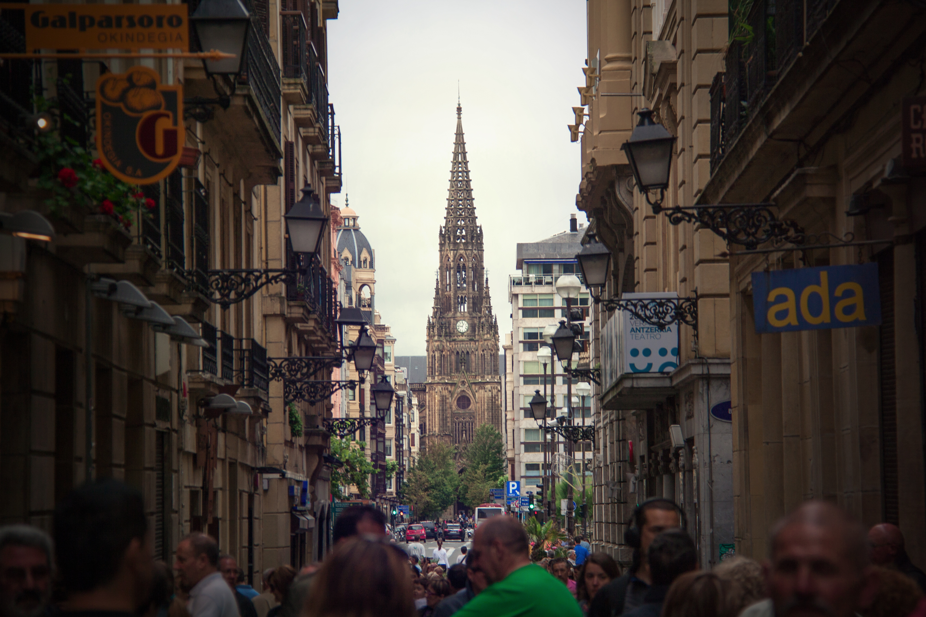 San Sebastián, España